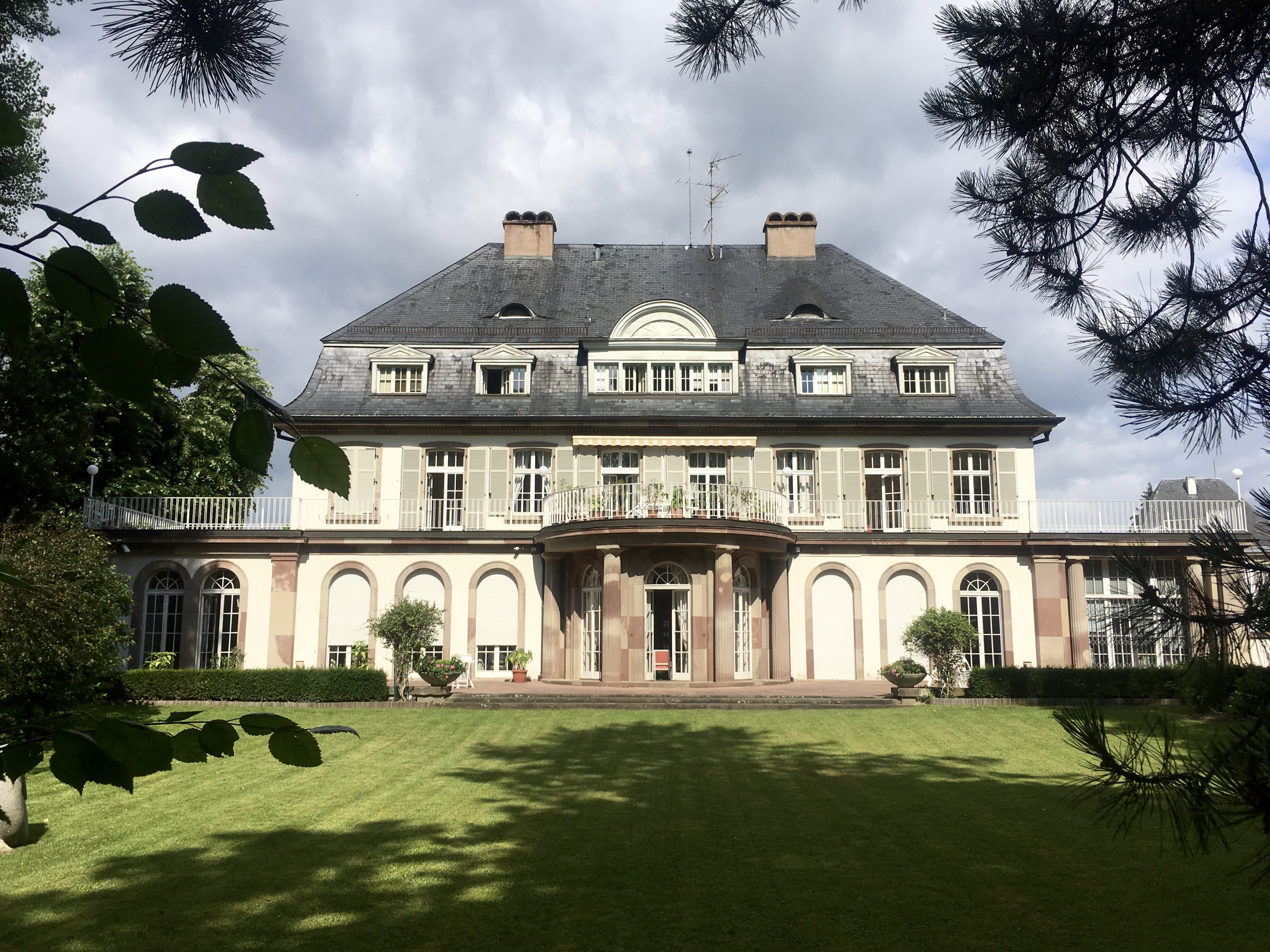 Représentation permanente de la France auprès du Conseil de l'Europe - côté jardin